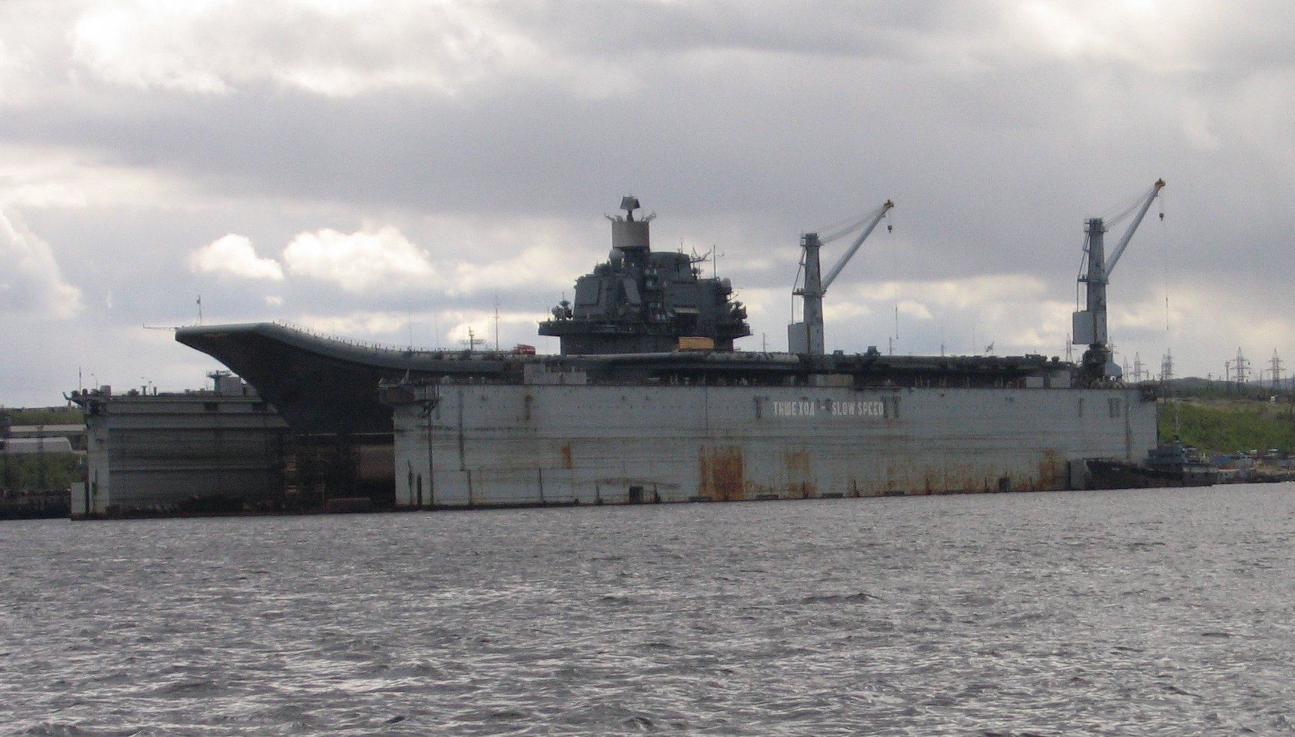 Aircraft carrier Admiral Kuznetsov (in dock)